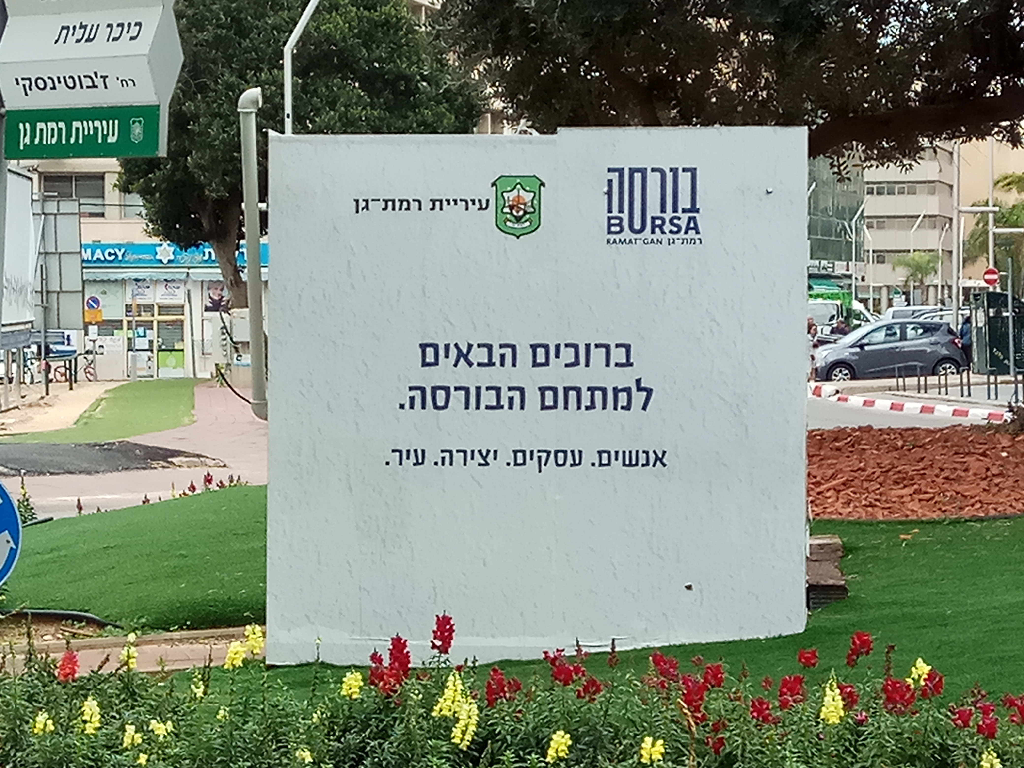 שלט בכיכר הכניסה למתחם הבורסה ברמת גן